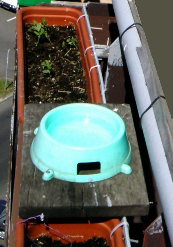 Poidło na balkonie dla ptaków